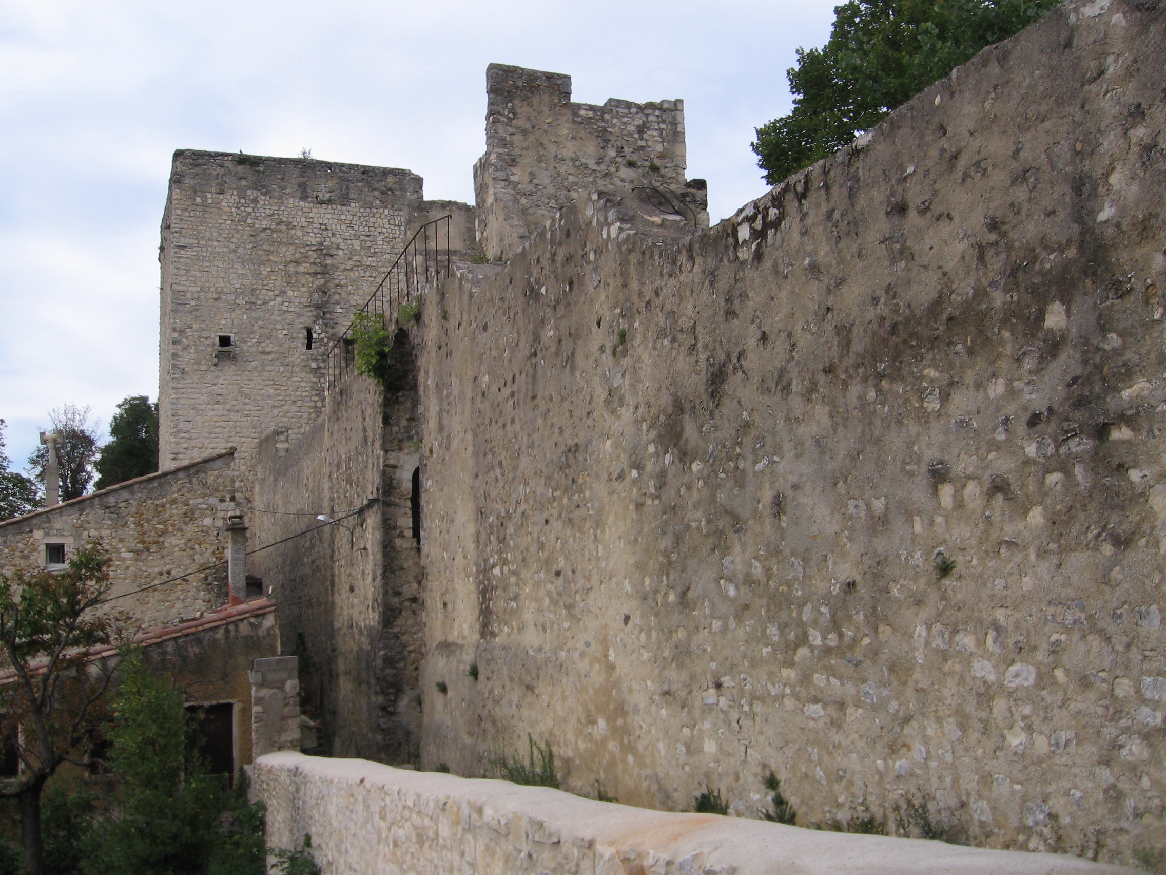 Château des Adhémar, Montelimar